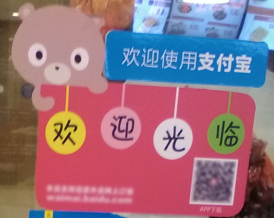 苏州如意菜饭一家门店粘贴的支付宝标识。